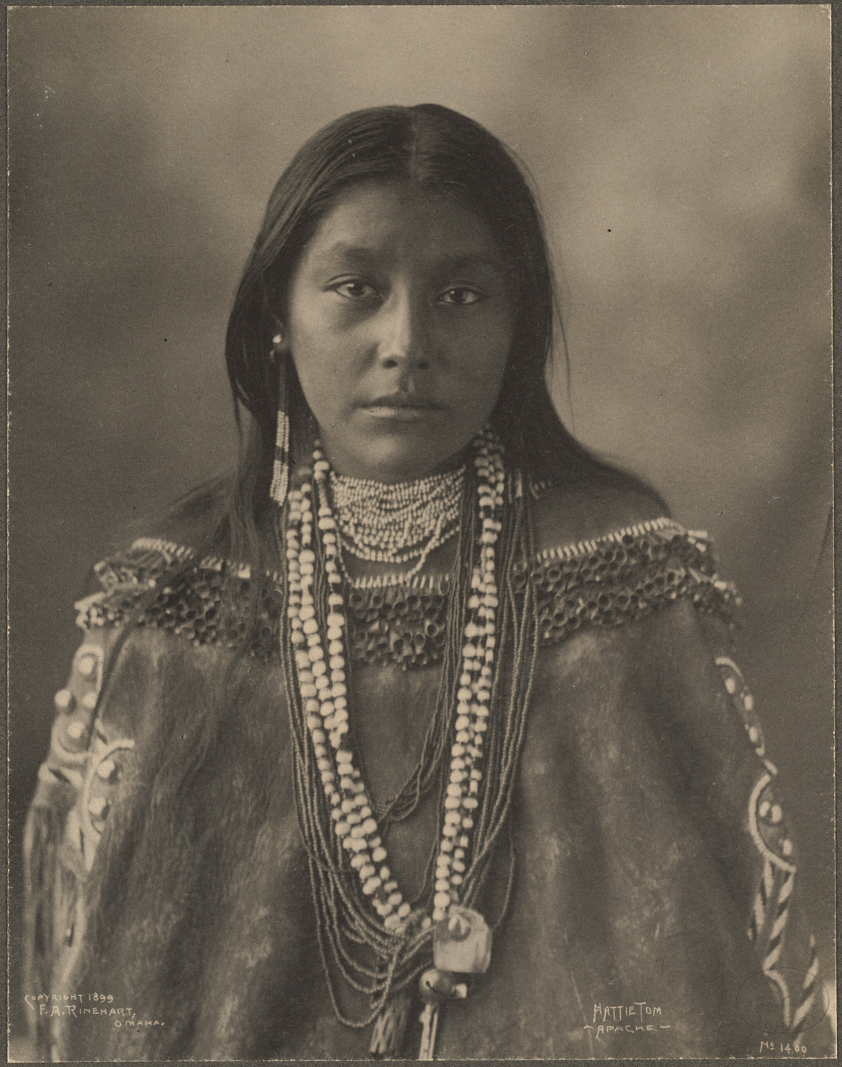 Hattie Tom, Apache